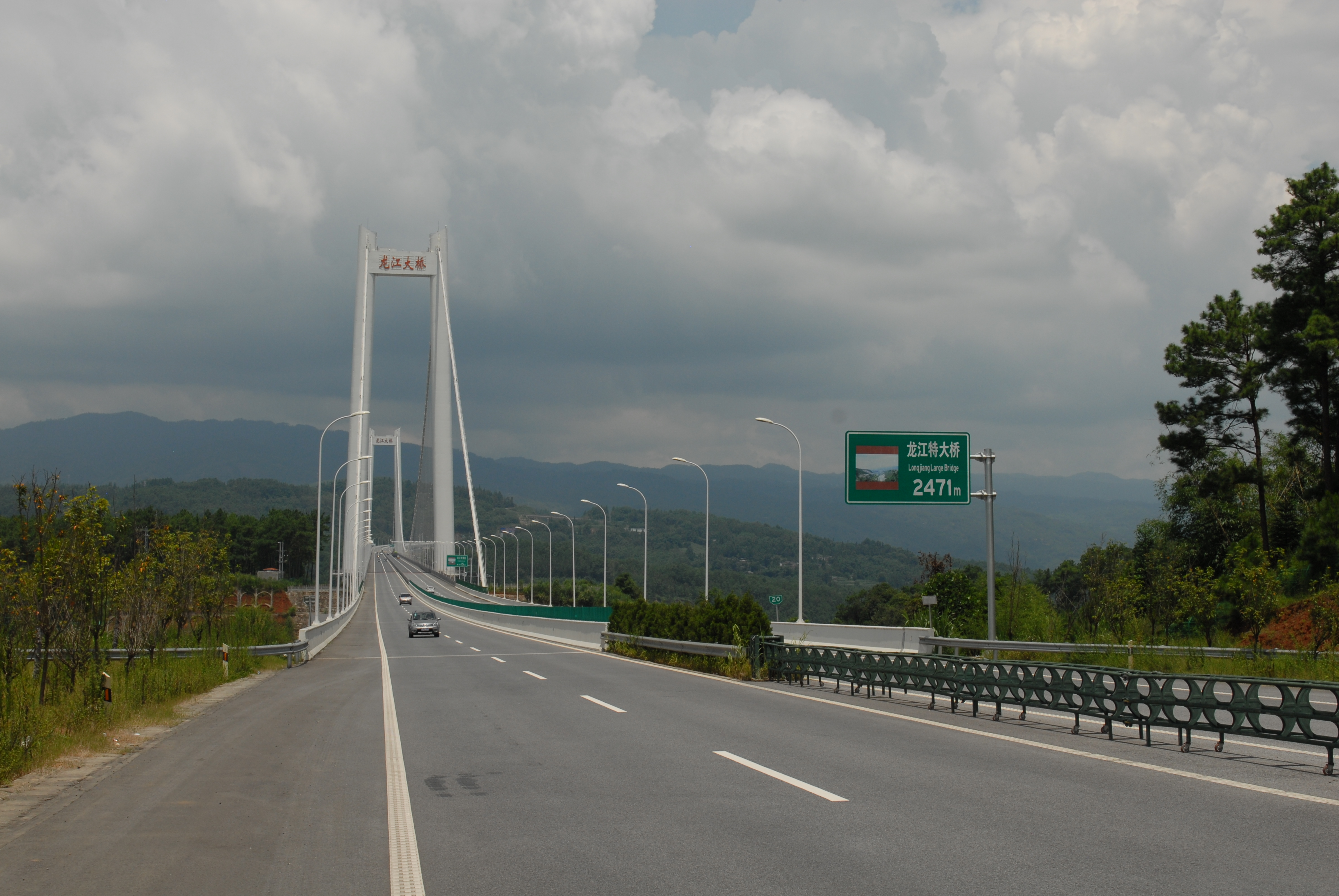 云南省保腾高速龙江特大桥